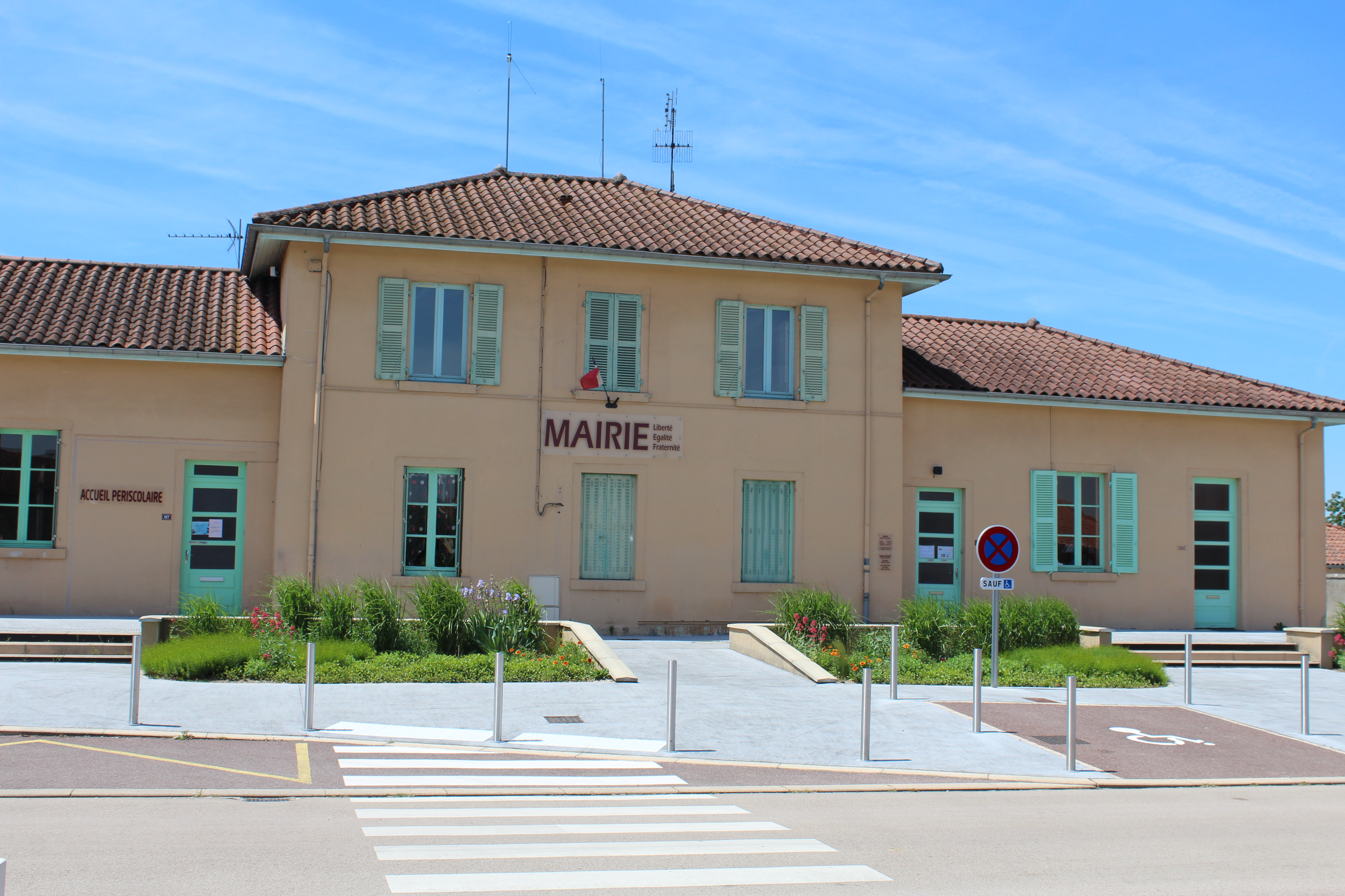 Mairie de Malafretaz.